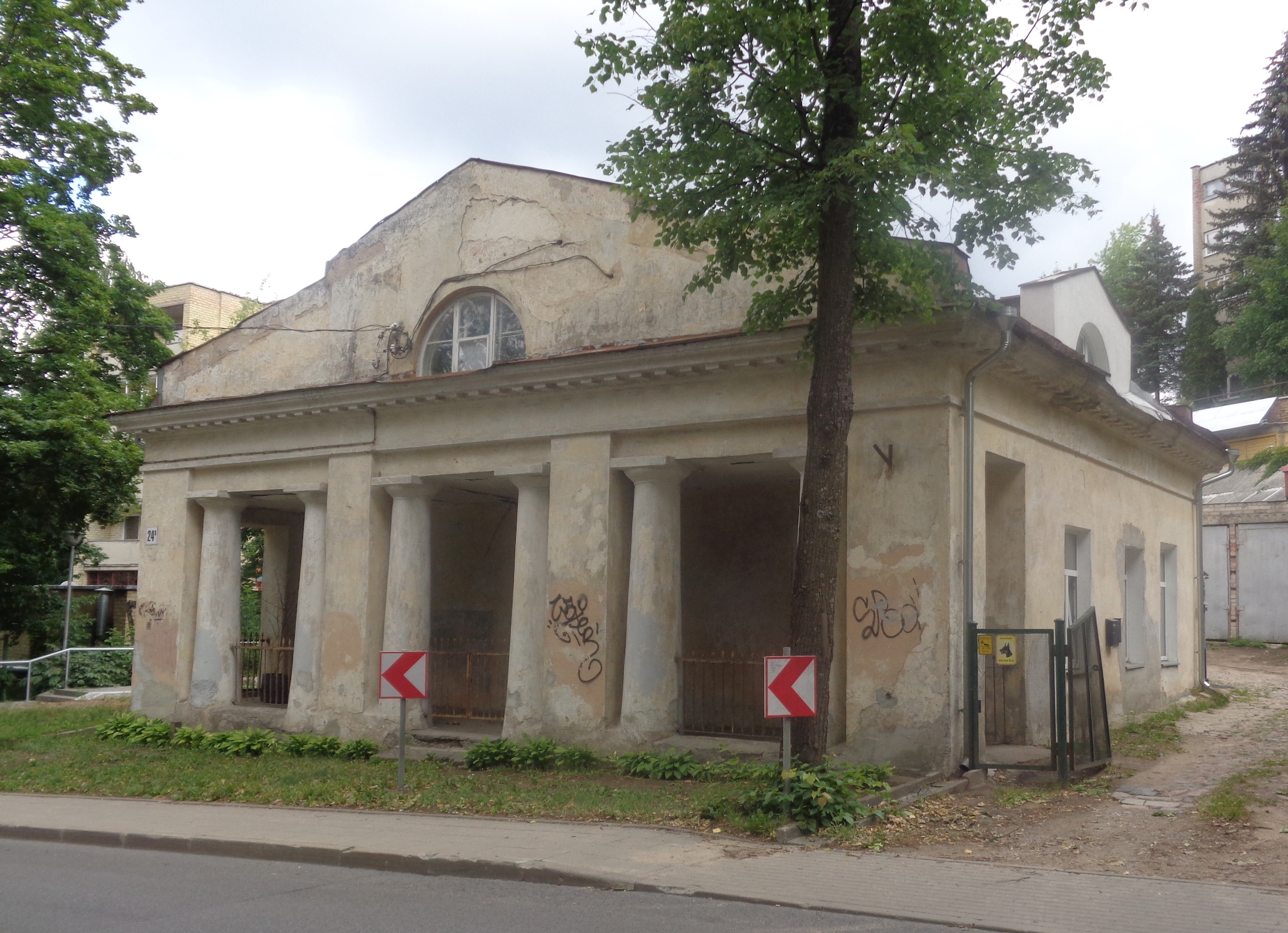 Кордегардия по проекту Жозефа Пусье (1781—1821) на основе типового проекта Андреяна Дмитриевича Захарова (постройка 1819)